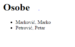 Rezultat jednog XSLT prevođenja.